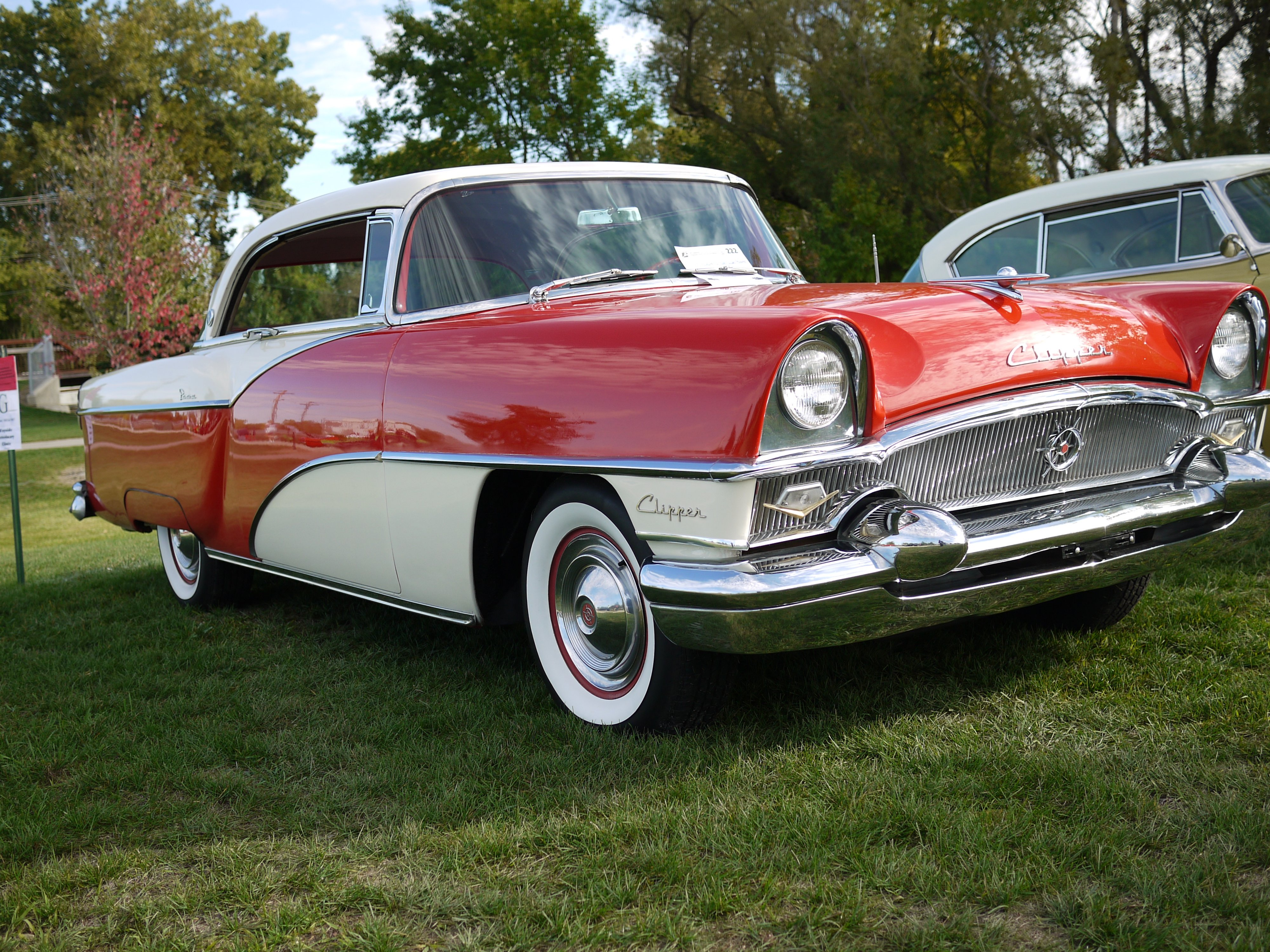 1955 Packard Clipper Super Panama (Model 5547)